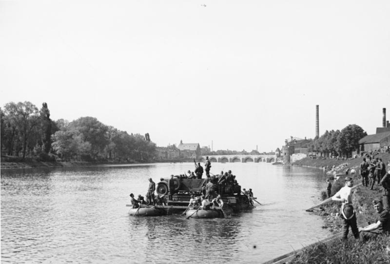 Maastricht. Übersetzen von Pak auf Fähre. 10.5.40 nachmittags